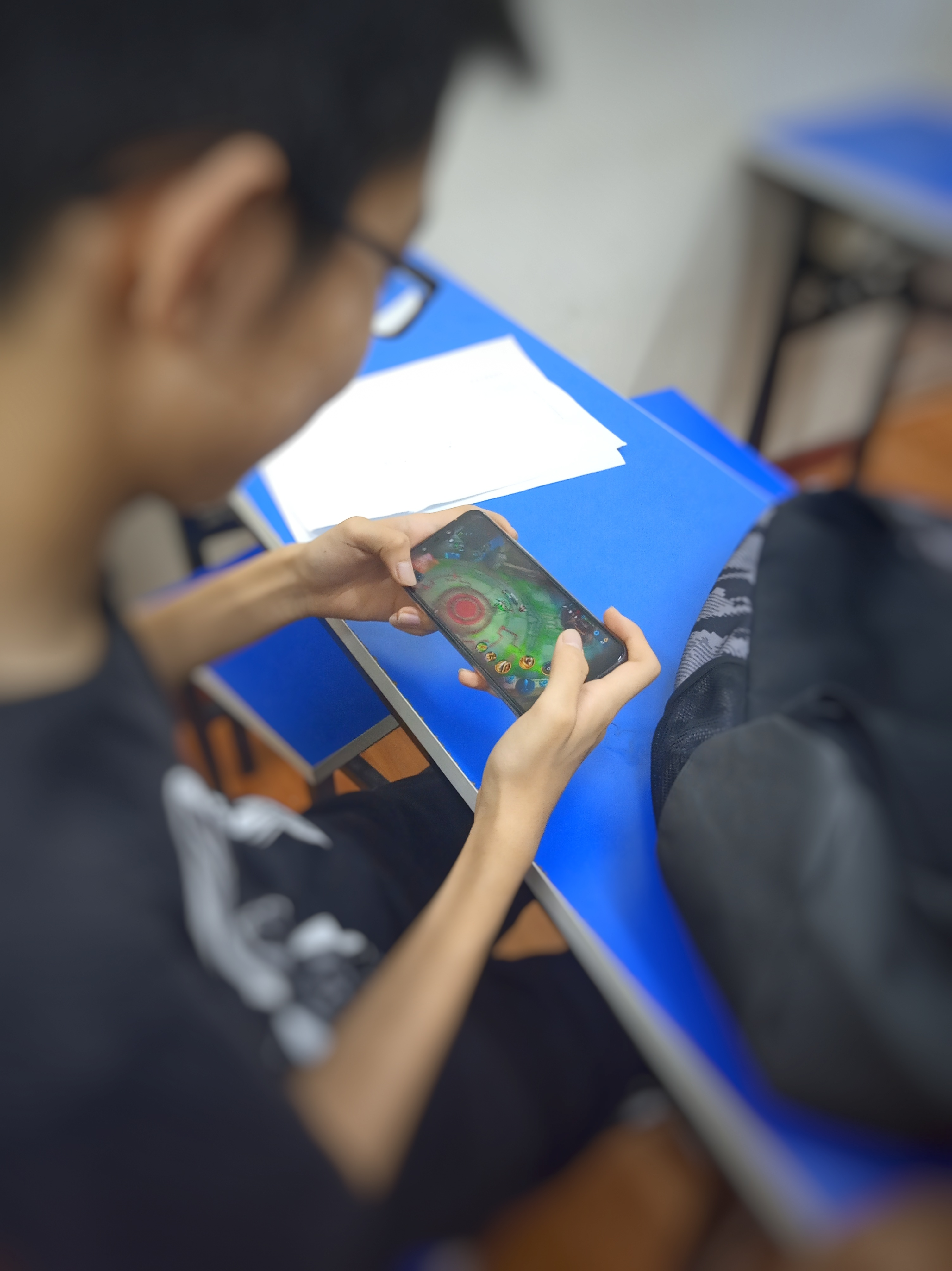 正在玩王者荣耀的学生